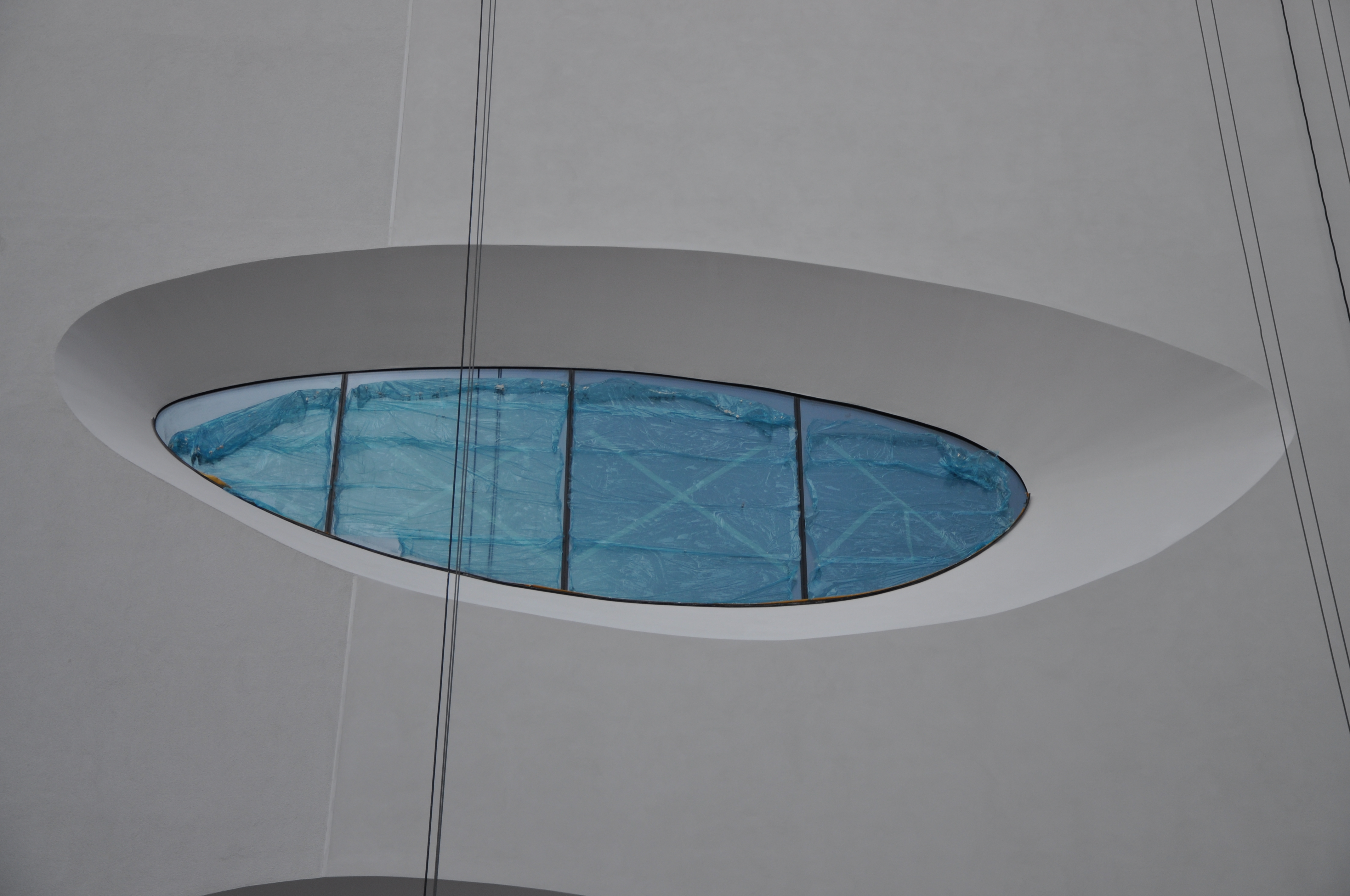 Okno na fasádě Obchodního centra Letmo, Brno